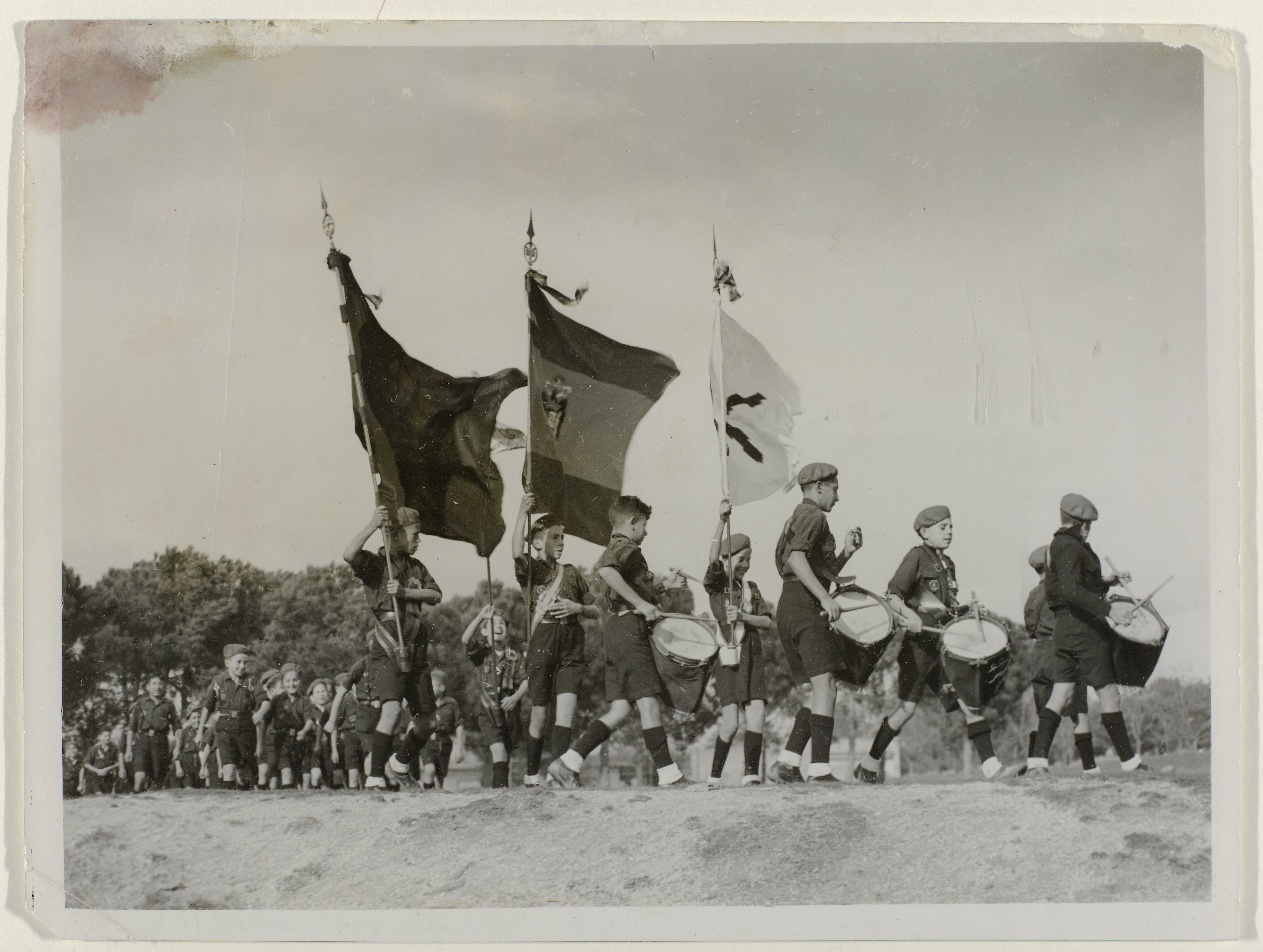 IdentificatieTitel(s): Fascistische jeugdverenigingDie Jungen von Altos de los Leones (titel op object)Objecttype: foto persfoto Objectnummer: NG-2011-11Omschrijving: Parade met vaandels en trommels door leden van de Spaanse fascistische jeugdvereniging in de bergen van de Altos de los Leones, 23 januari 1941. Op de achterzijde twee stempels en blaadje met perstekst in het Duits.VervaardigingVervaardiger: fotoagentschap: Associated Press Berliner Büro (vermeld op object)fotograaf: anoniemfotoagentschap: Recla Internationale Persfoto Centrale (vermeld op object)Plaats vervaardiging: fotoagentschap: Berlijnfotograaf: Spanjefotoagentschap: AmsterdamDatering: 23-jan-1941Fysieke kenmerken: ontwikkelgelatinezilverdrukMateriaal: fotopapier Techniek: ontwikkelgelatinezilverdrukAfmetingen: h 181 mm × b 240 mmOnderwerpWat: Spaanse BurgeroorlogTweede WereldoorlogWanneer: 1941 - 1941Waar: SpanjeVerwerving en rechtenVerwerving: aankoop feb-2011Copyright: Publiek domein